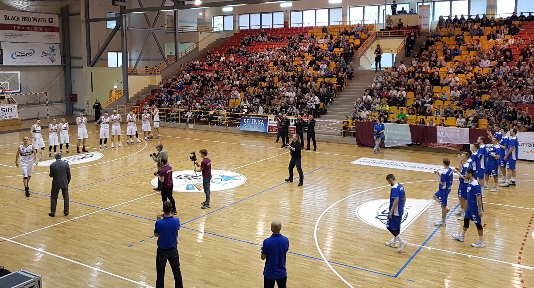 Wyróżnienie Huberta Pabiana, MVP